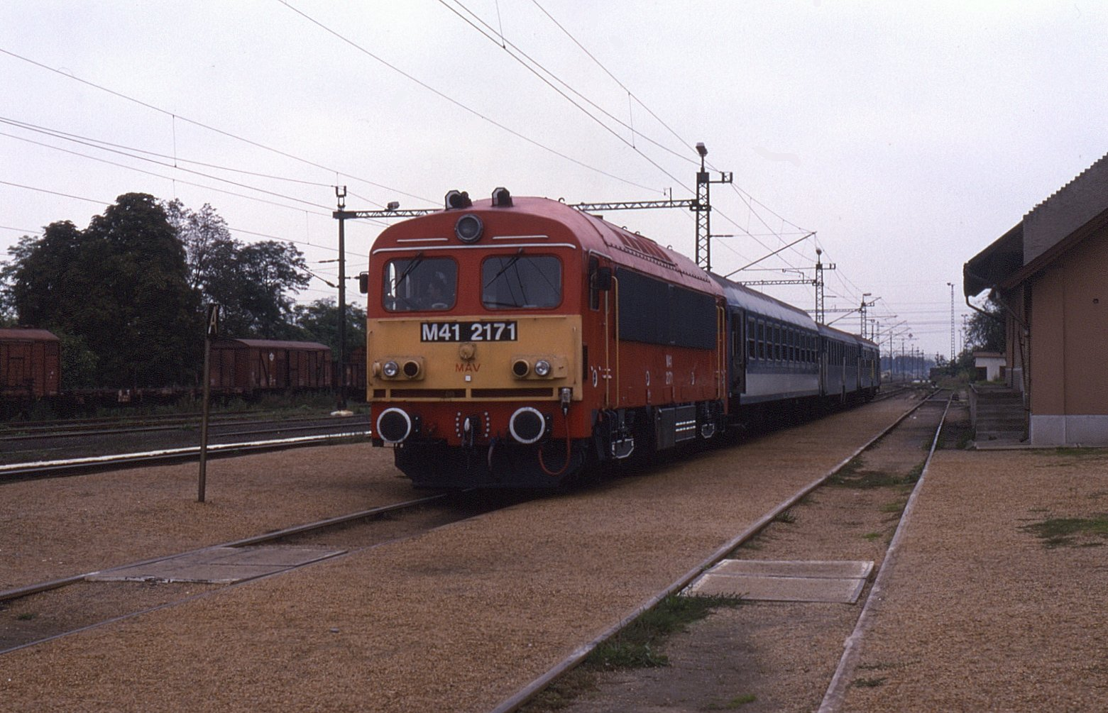 M41 2171 seen at Kazincbarcika on 21 September 1996.